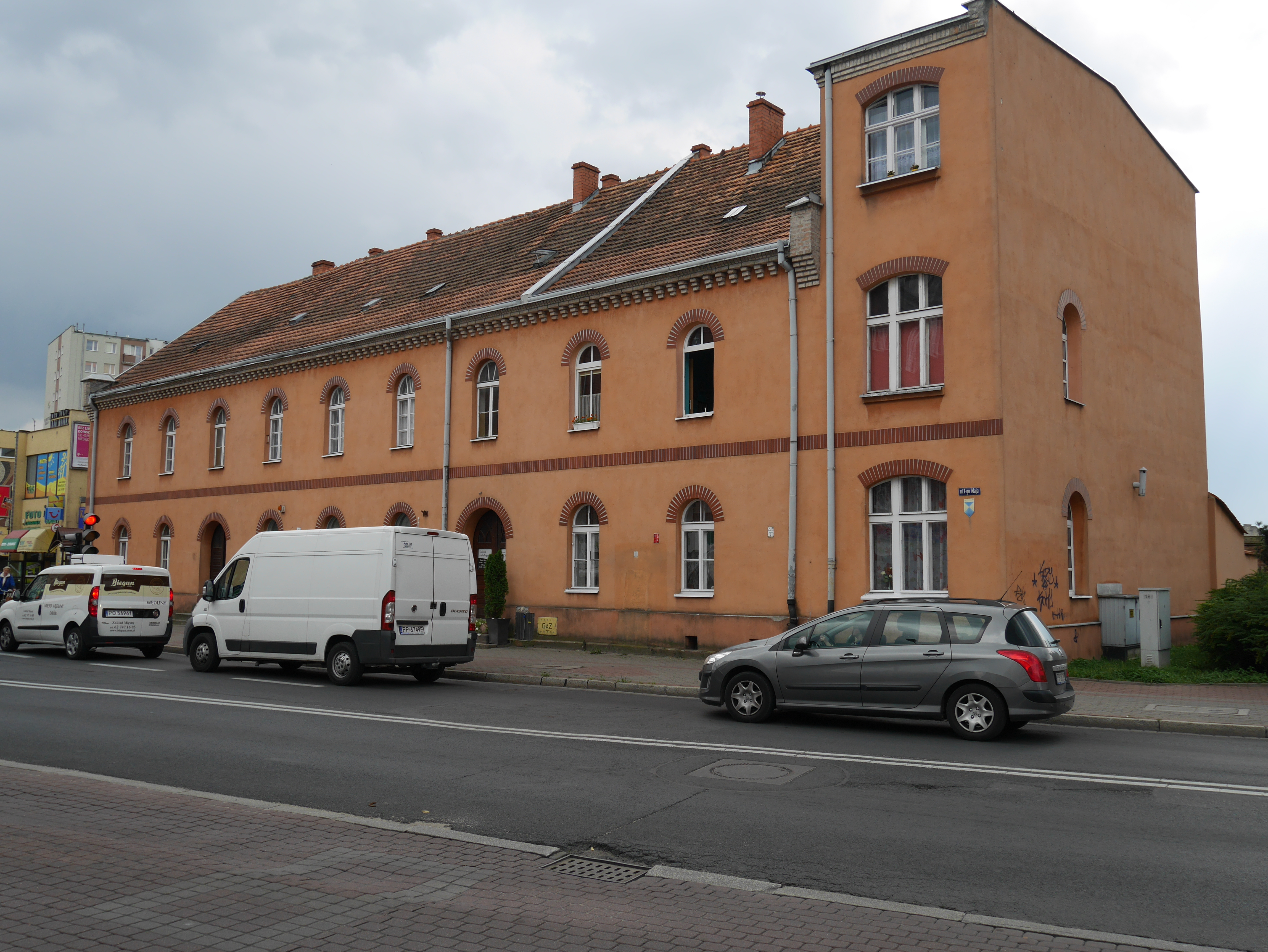 Piła, arsenał, ob. budynek mieszkalny, 1843